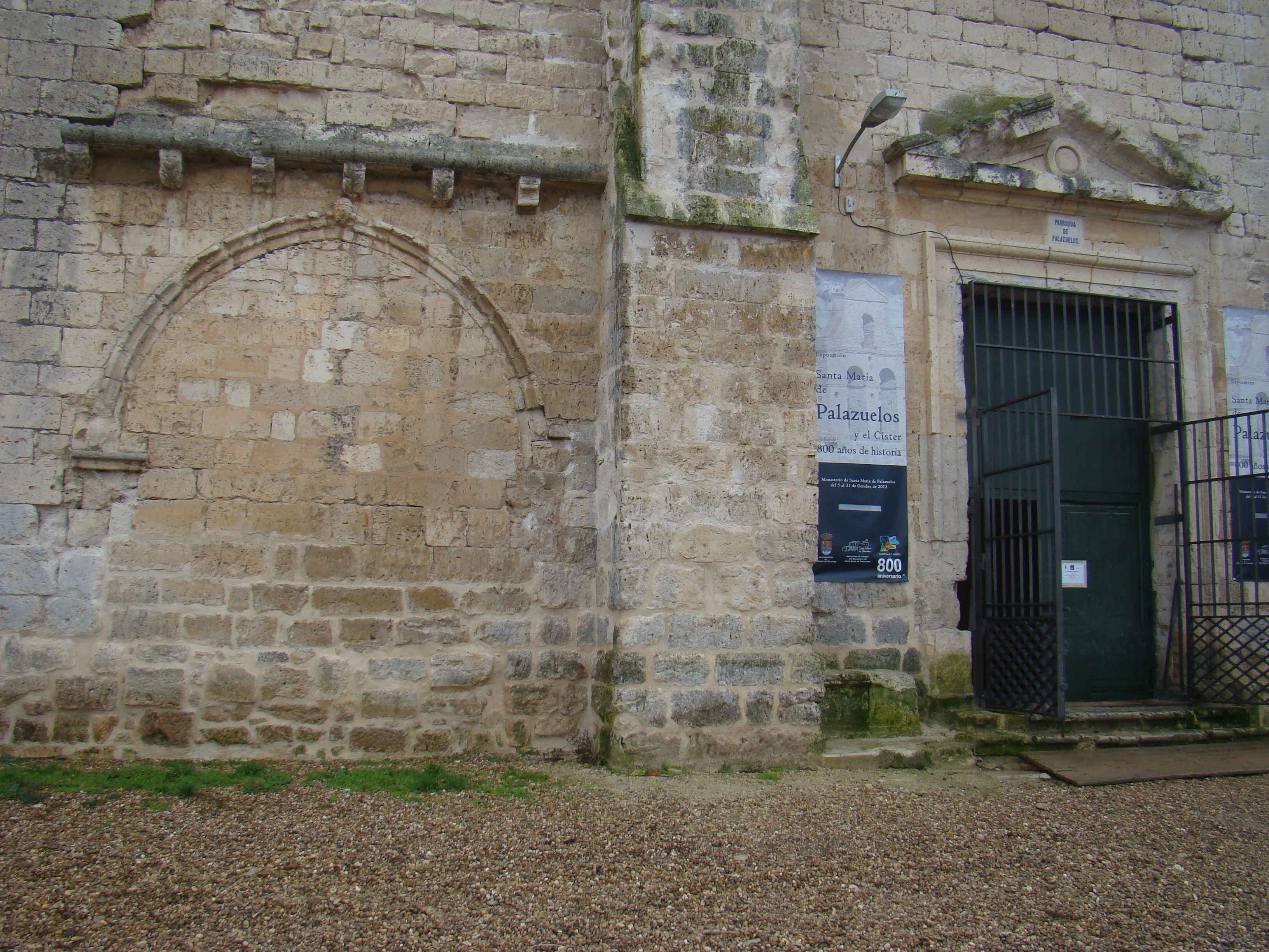 Monasterio de Palazuelos en la provincia de Valladolid. Fachada norte con la puerta cegada que daba al cementerio de los monjes y la puerta de Juan de Nates.